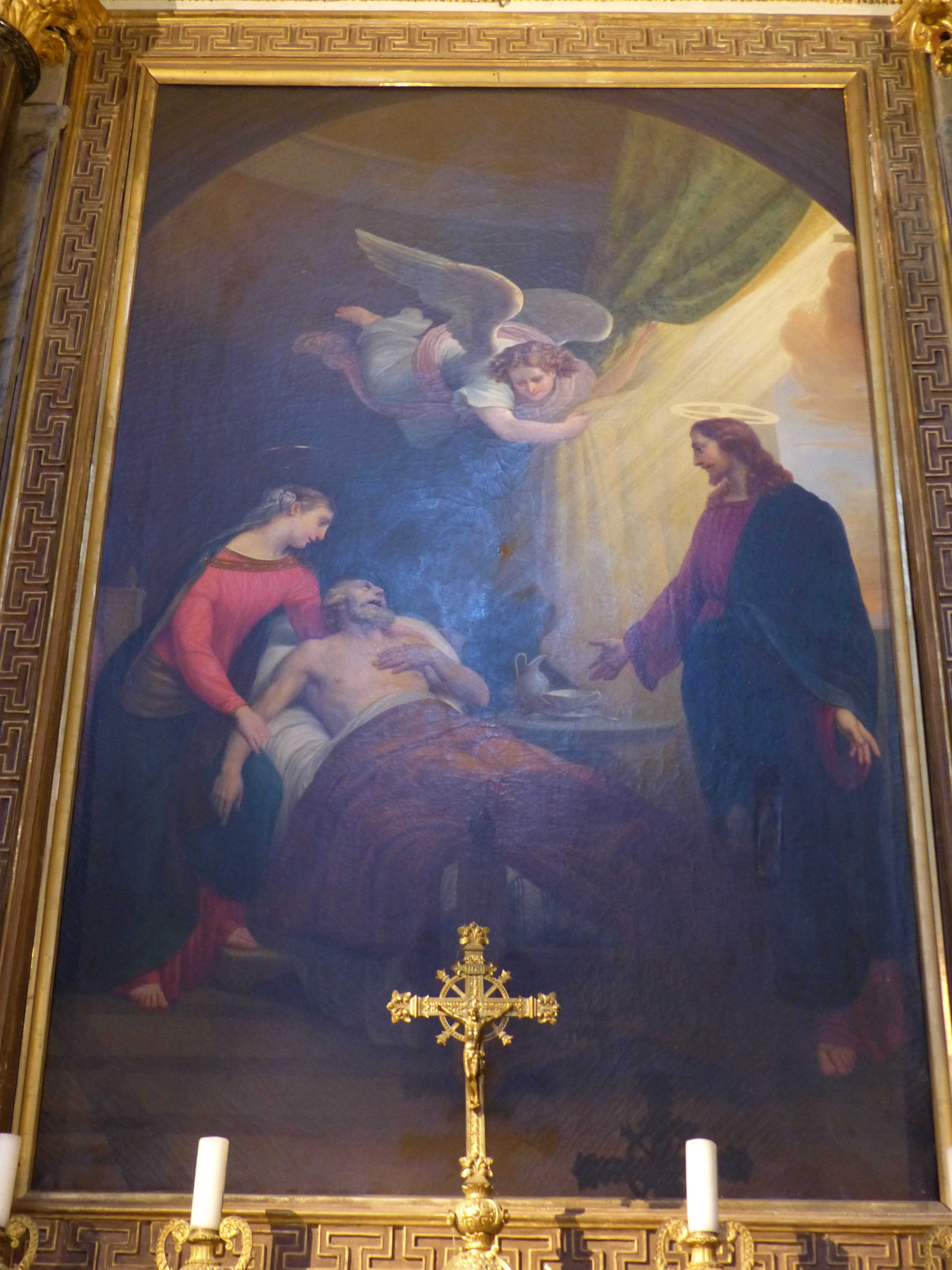 Nice (Alpes-Maritimes, France), cathédrale Ste Réparate, quatrième chapelle méridionale en partant de l'entrée, dédiée à St Joseph; toile de Jean-Baptiste Biscarra en 1842 la Mort de St Joseph.